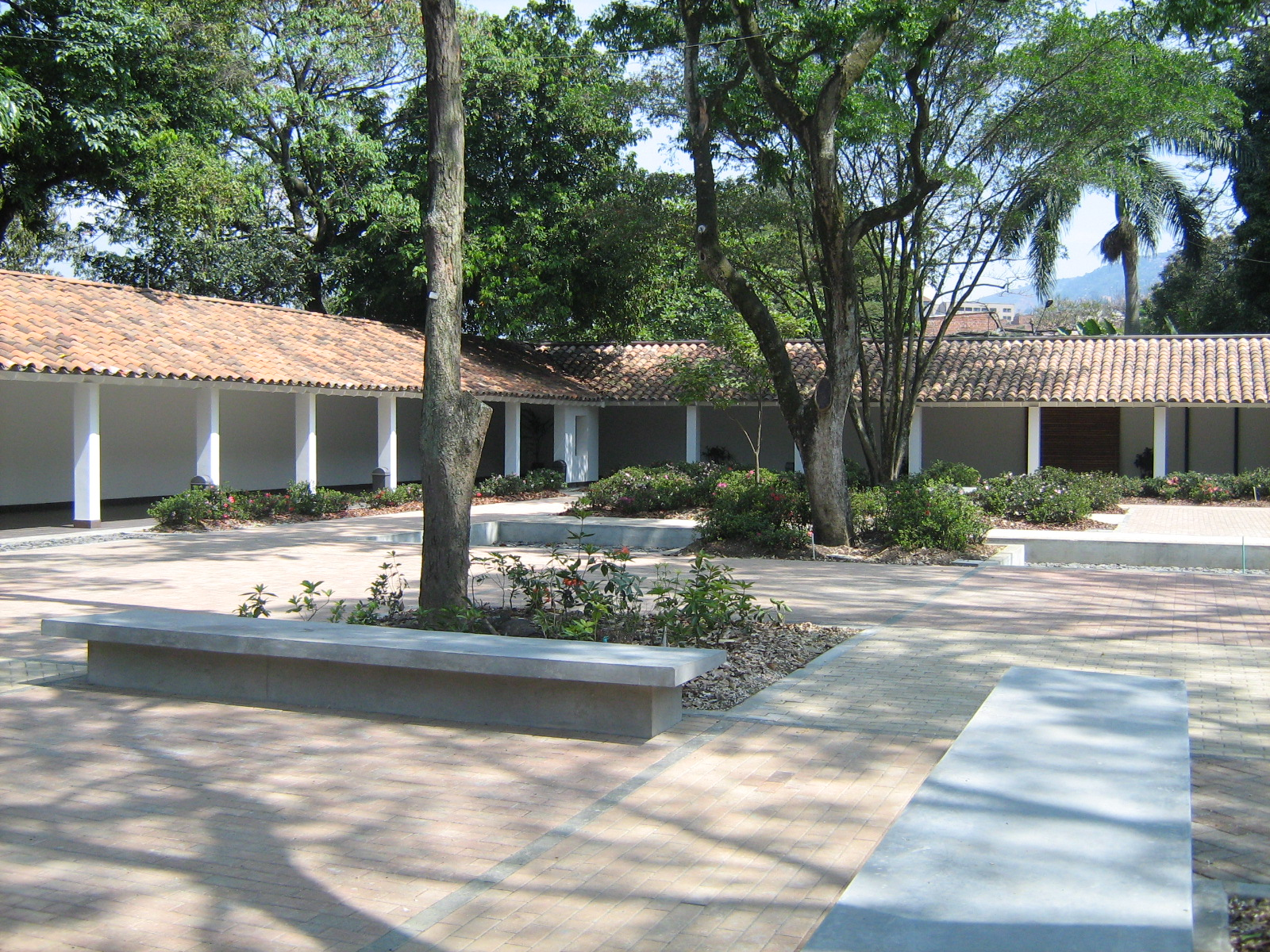 Patio de las Azaleas en el Jardín Botánico de Medellín, Colombia